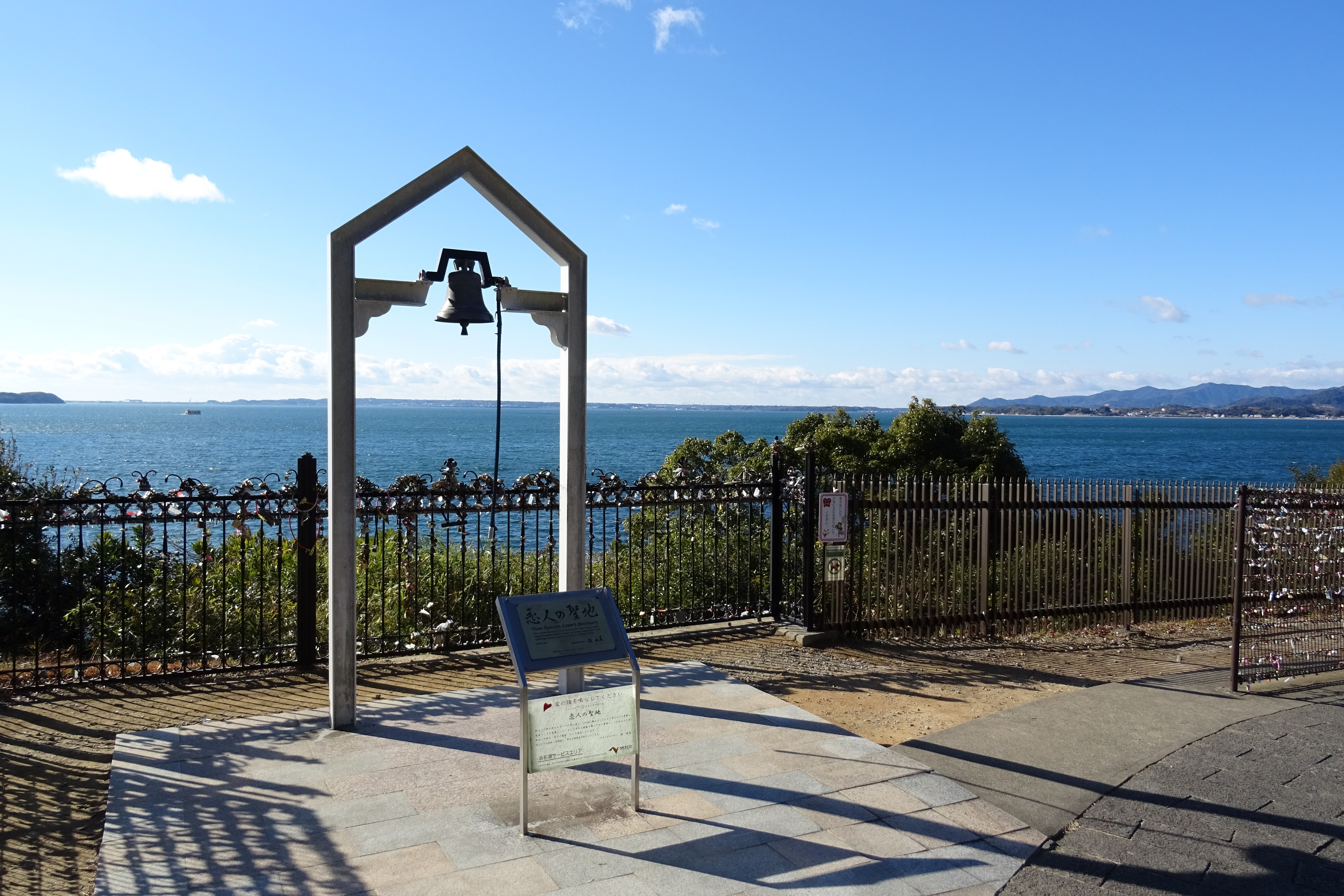 浜名湖恋人の聖地